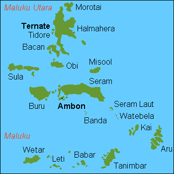 map Maluku islands, Indonesia